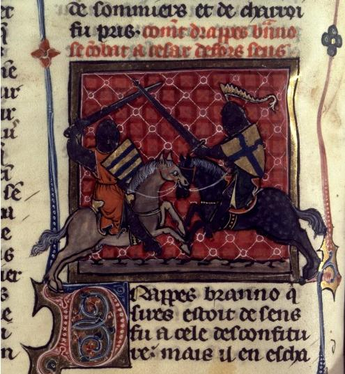 César contre Drappès enluminure BNF